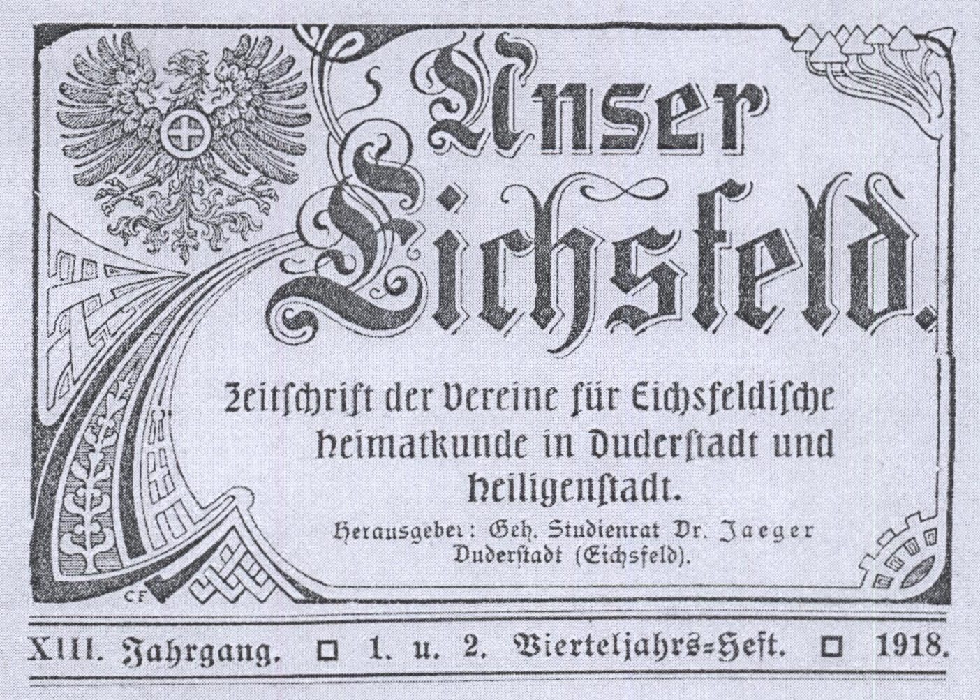 Zeitschrift "Unser Eichsfeld." von 1918 (Verlag Cordier Heiligenstadt)